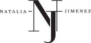 Natalia Jiménez logo